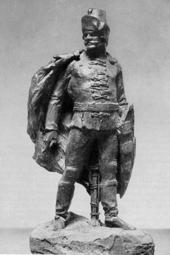 Mária Terézia szobor mellékalakja Pozsonyban, az egykori koronázási domb helyén. Az emlékművet a csehszlovák légió katonái 1921. október 26-27-én, a város megszállását követően, elpusztították. A szobor talapzatán a "vitam et sanguinem" (életünket és vérünket) felirat olvasható.